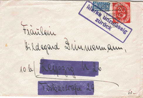 Brief in die DDR mit nicht notwendiger Notopfermarke. Dort beanstandet und Rücksendung mit entsprechendem Stempel.